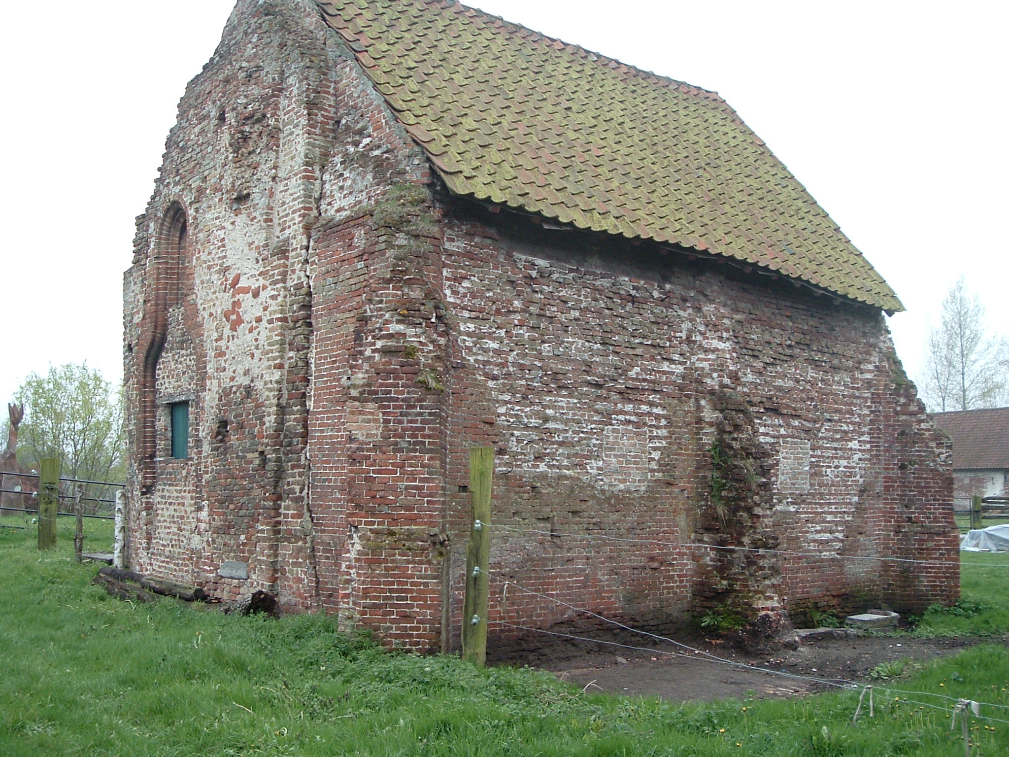 Hoeve Engelendale (kapel?), Assebroek, in 2005